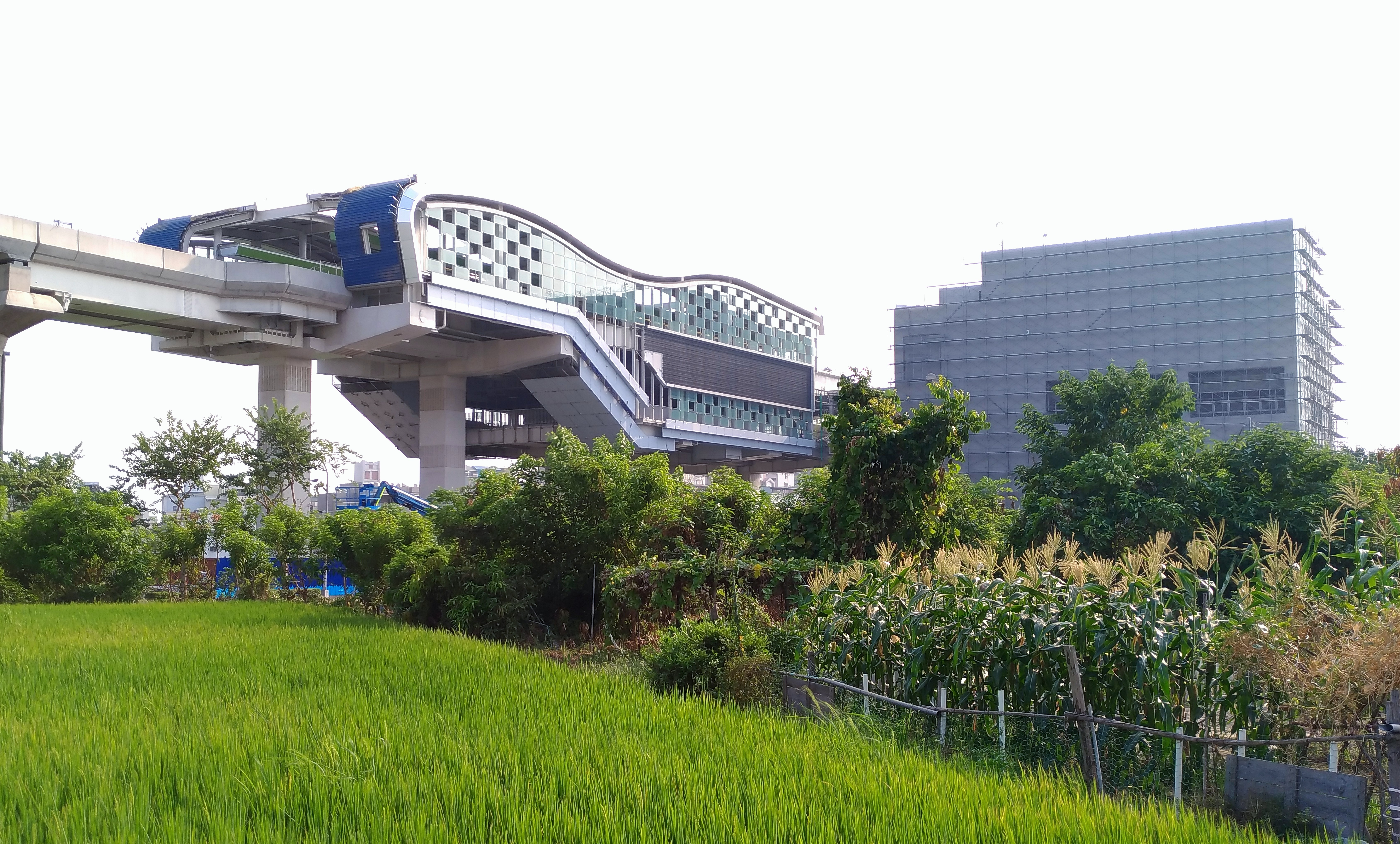 臺中捷運G14站2017年10月工程